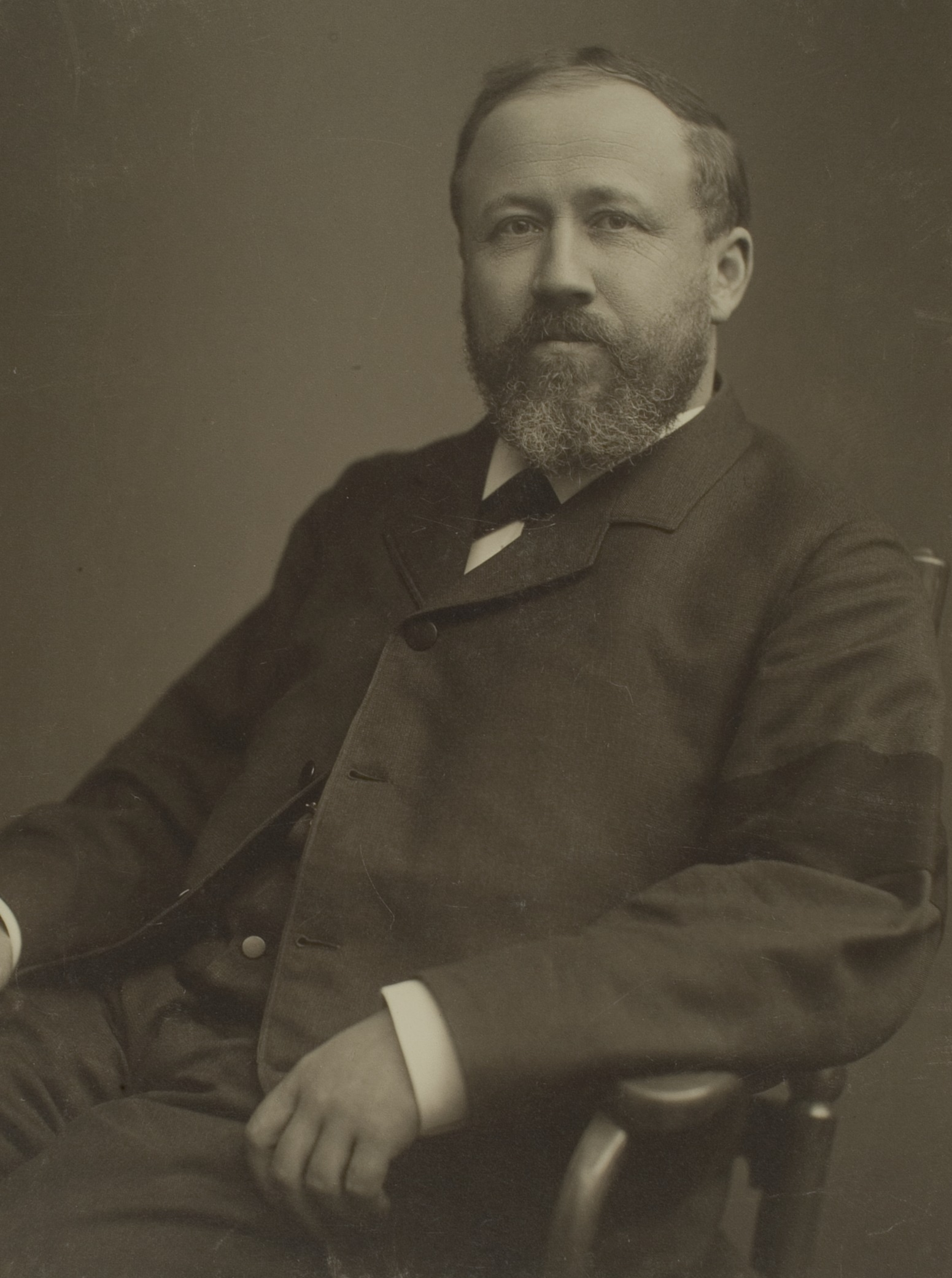 Hans Georg Wilhelm von Schubert, Theologe, 1906–1928 Professor in Heidelberg